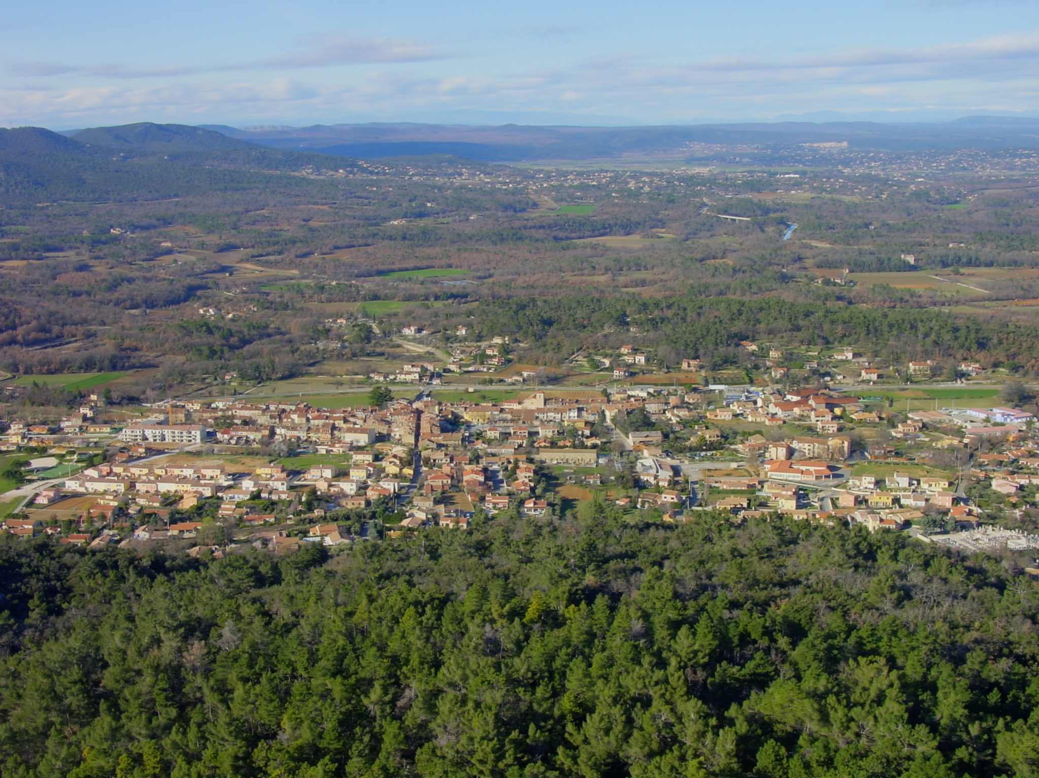 Vue de Rougiers en HDR